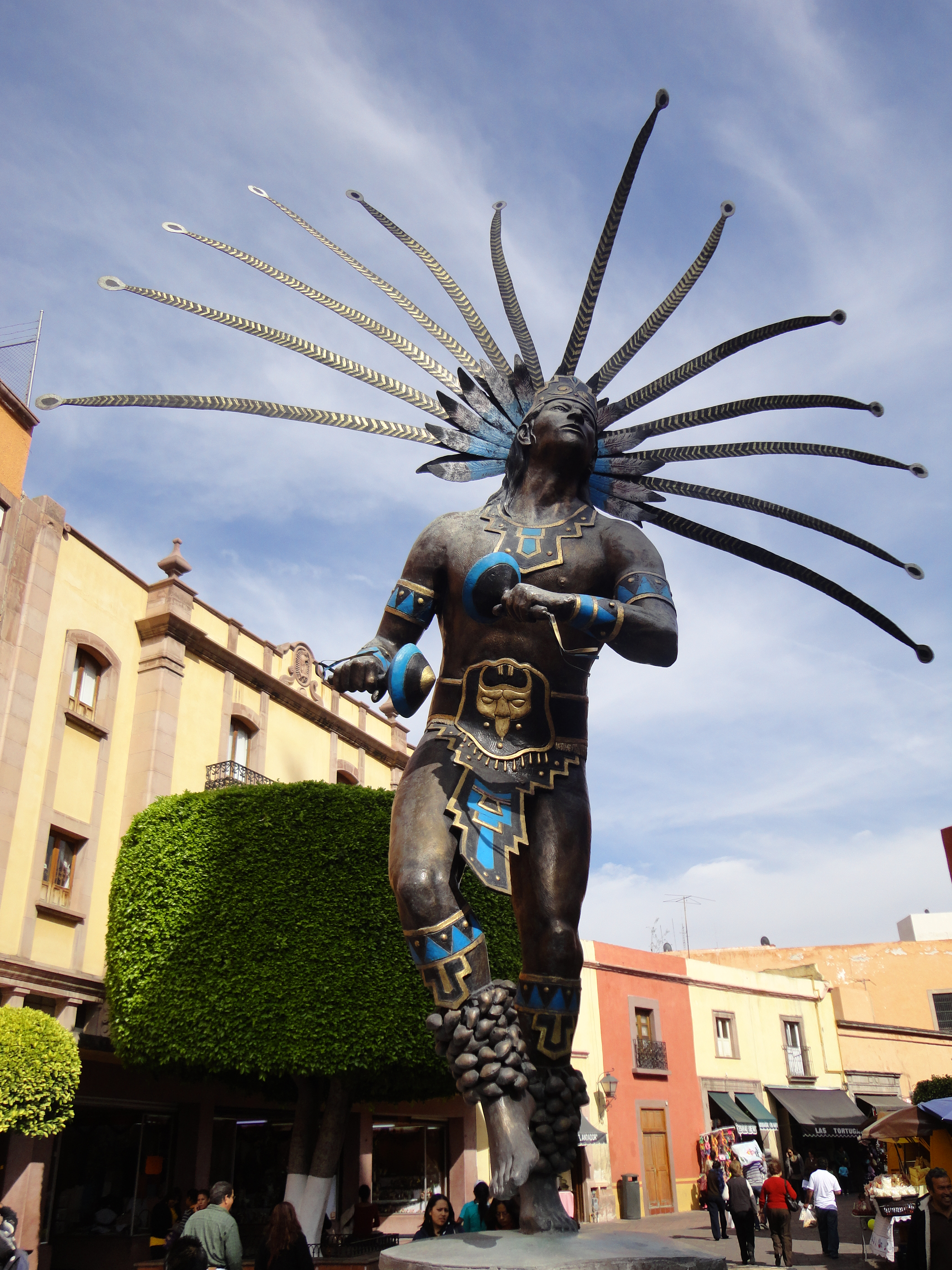 Escultura de El Danzante Conchero Chichimeca, Santiago de Querétaro, Qro, México.